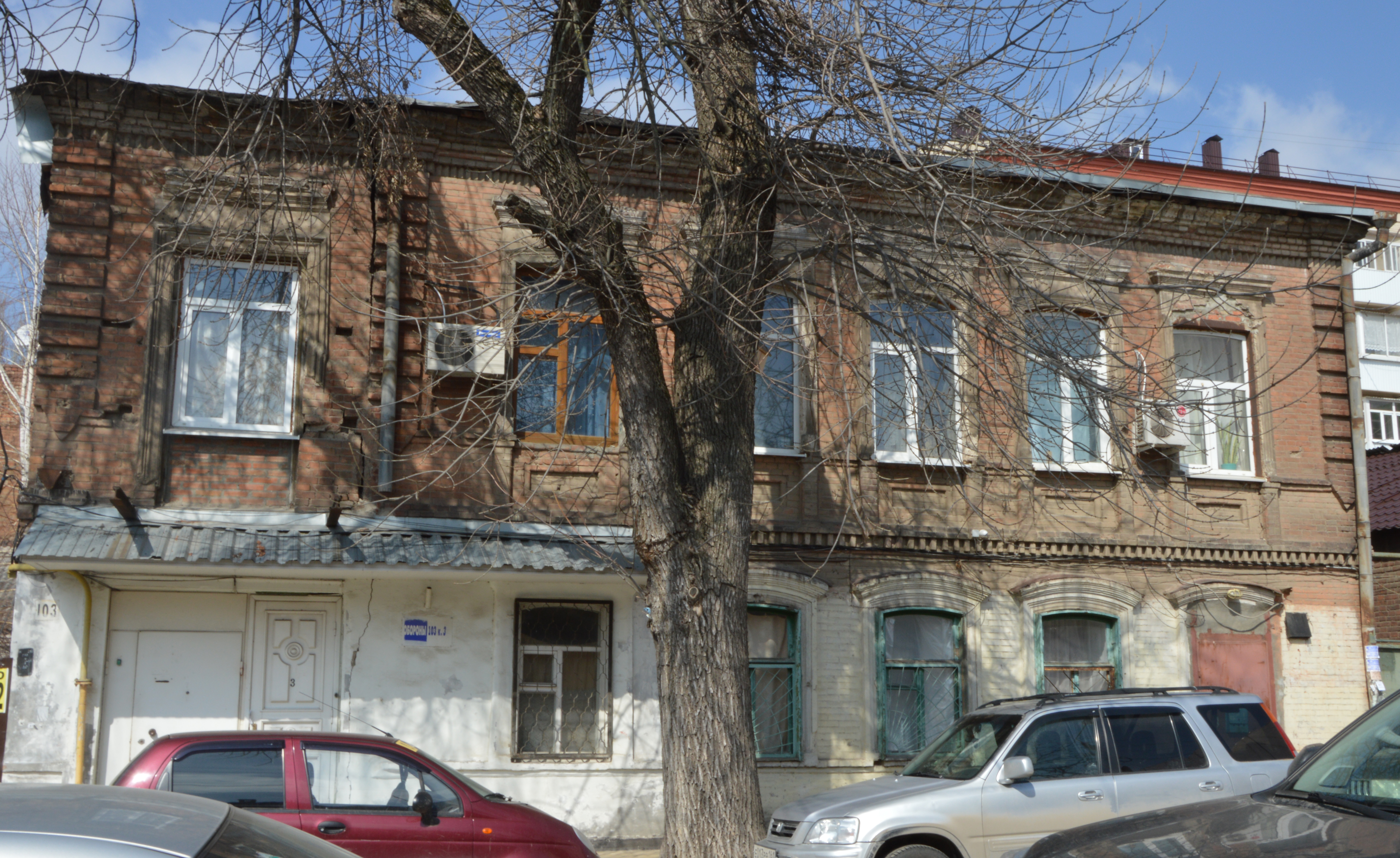 Здание города Ростова-на-Дону